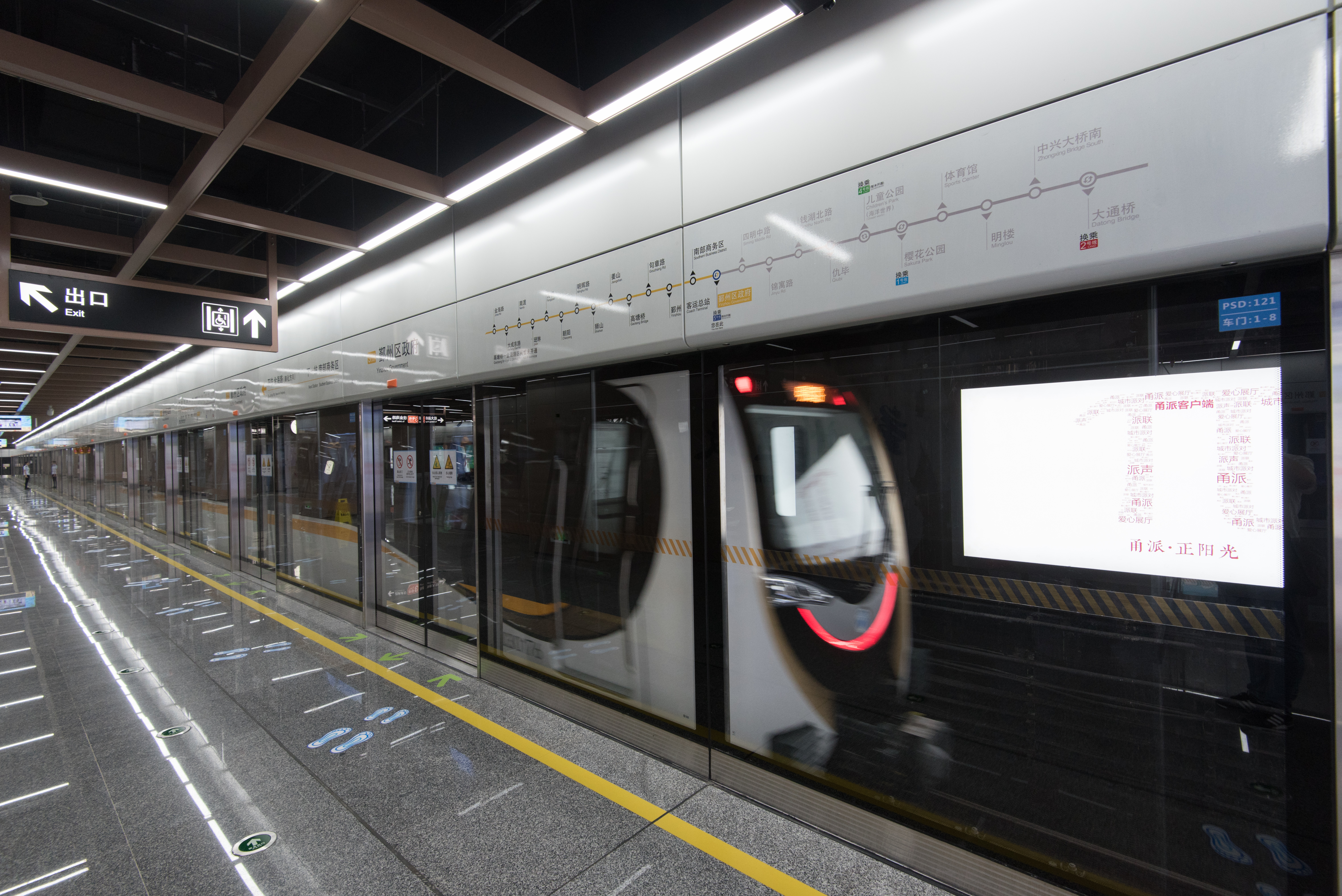 驶离鄞州区政府站的宁波轨道交通3号线列车